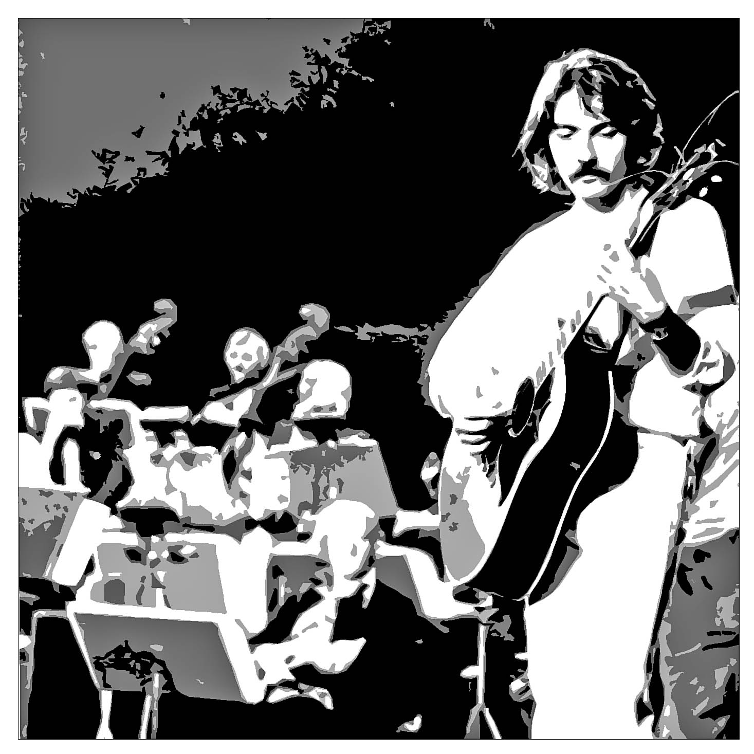 Lieven / Nekka 1976 / o.l.v Rogier van Otterloo